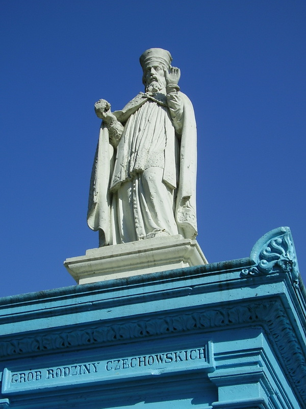 Лунна. Касцёл. Надмагілле Чахоўскіх